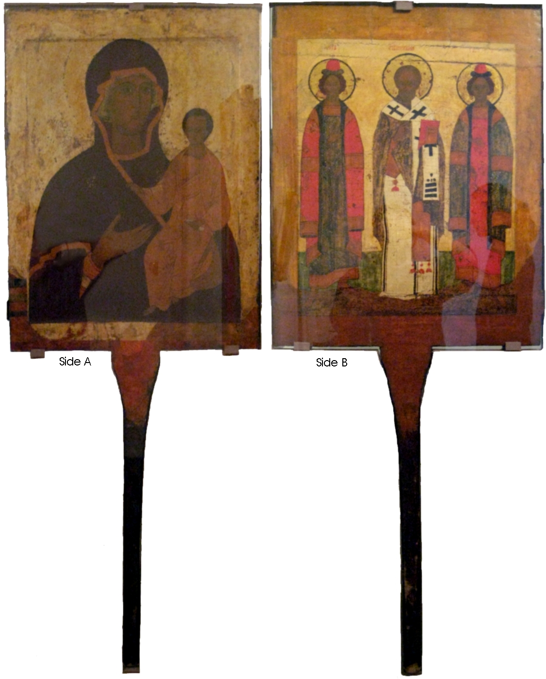 Двусторонняя выносная икона. Богоматерь Одигитрия Смоленская. На обороте - Никола, Борис и Глеб. Two-sided portable icon for Crucession: A. Our Lady of Smolensk. B. Ss. Nicolas, princes Boris and Gleb